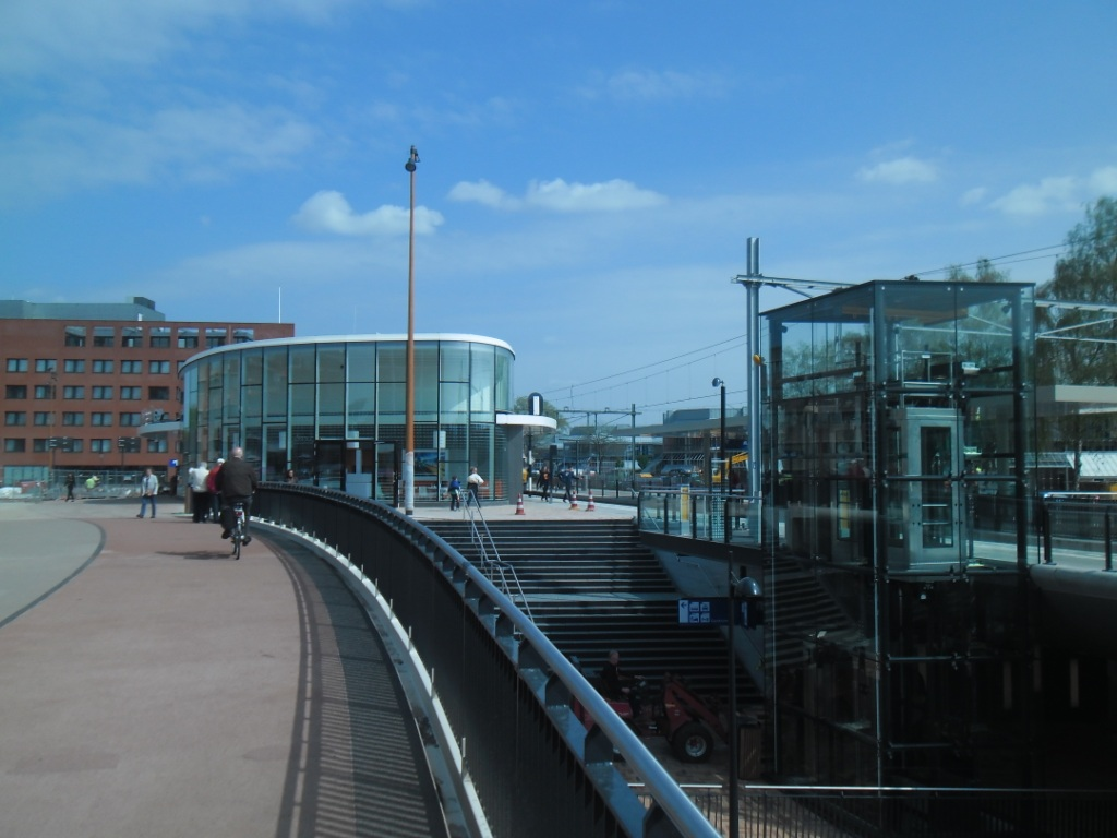 Het vernieuwde station Helmond (april 2014)